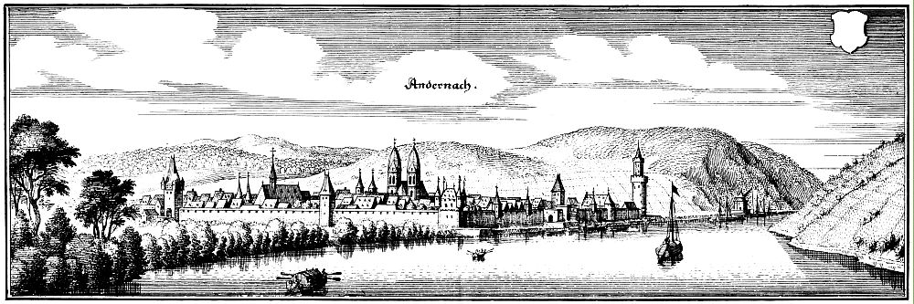 Ansicht von Andernach im Jahre 1646